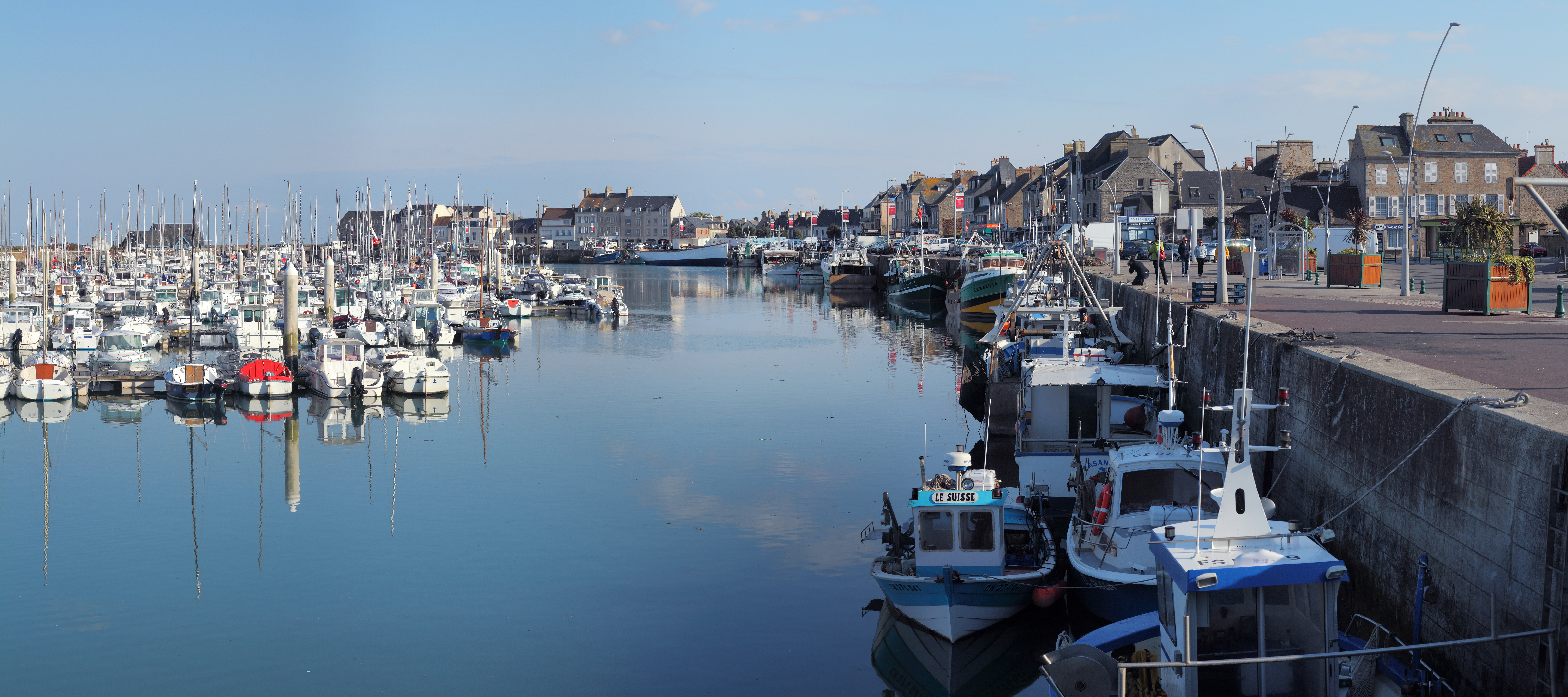 Port de plaisance de Saint-Vaast-la-Hougue, dans la Manche. Les bateaux de pêche conservent leur emplacement originel, sur l'ancien quai, à droite sur la photo.